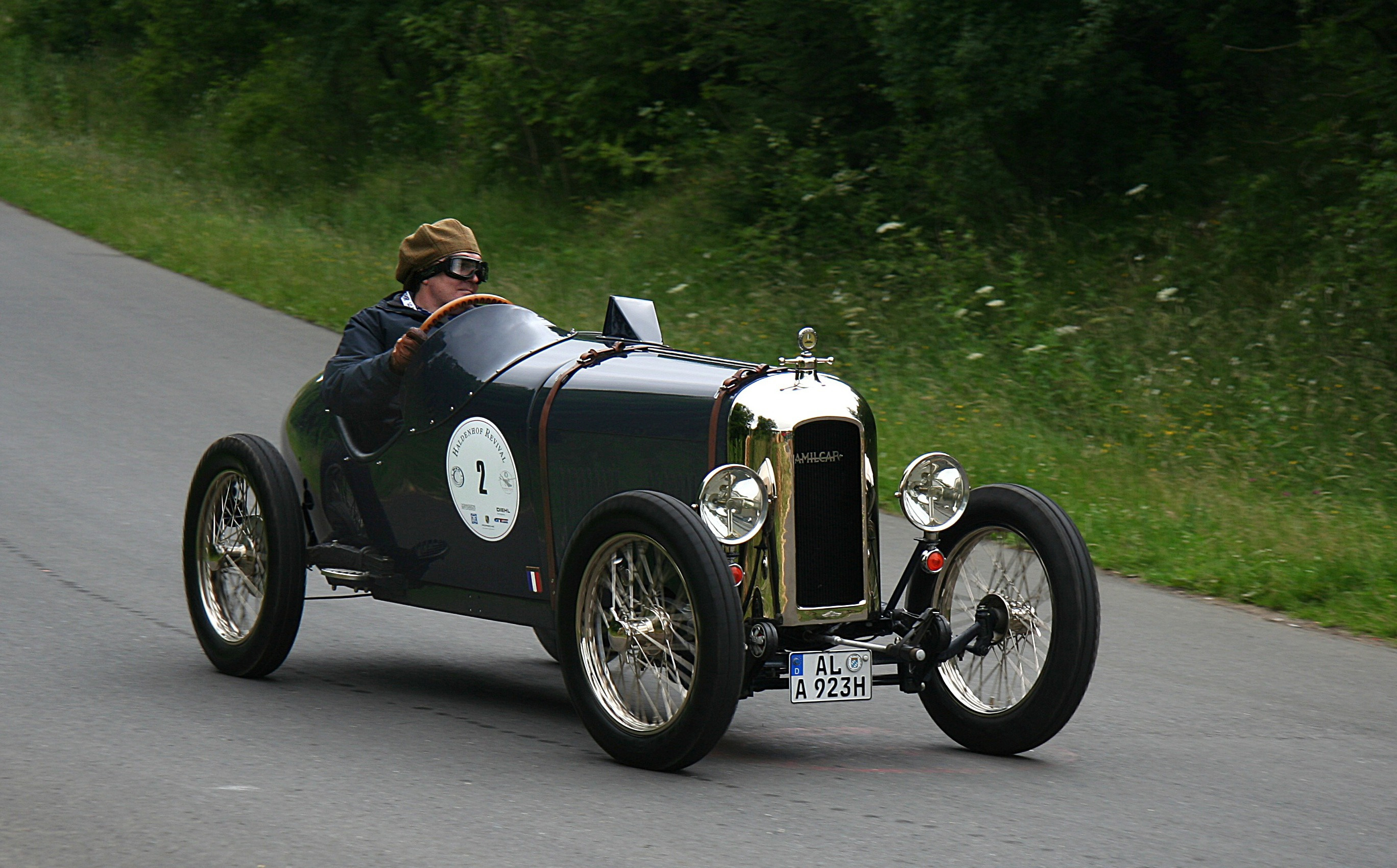 Amilcar CS mit Duval-Karosserie, 4-Zyl.-Motor, 985 cm³, 23 PS, beim Oldtimer Festival des DAMC 05 auf dem noch erhaltenen Teil der Südschleife des Nürburgrings. Kennzeichen auf Wunsch des Fahrzeugbesitzers anonymisiert.